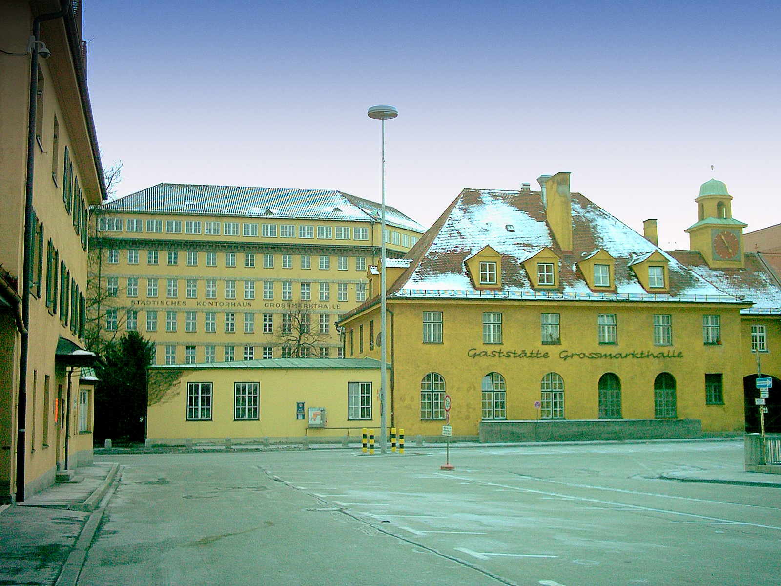 Großmarkthalle, Munich-Sendling: Gaststätte Großmarkthalle and historic Kontorhaus1. Image taken by Dominik Hundhammer, München, 28 February 2006.